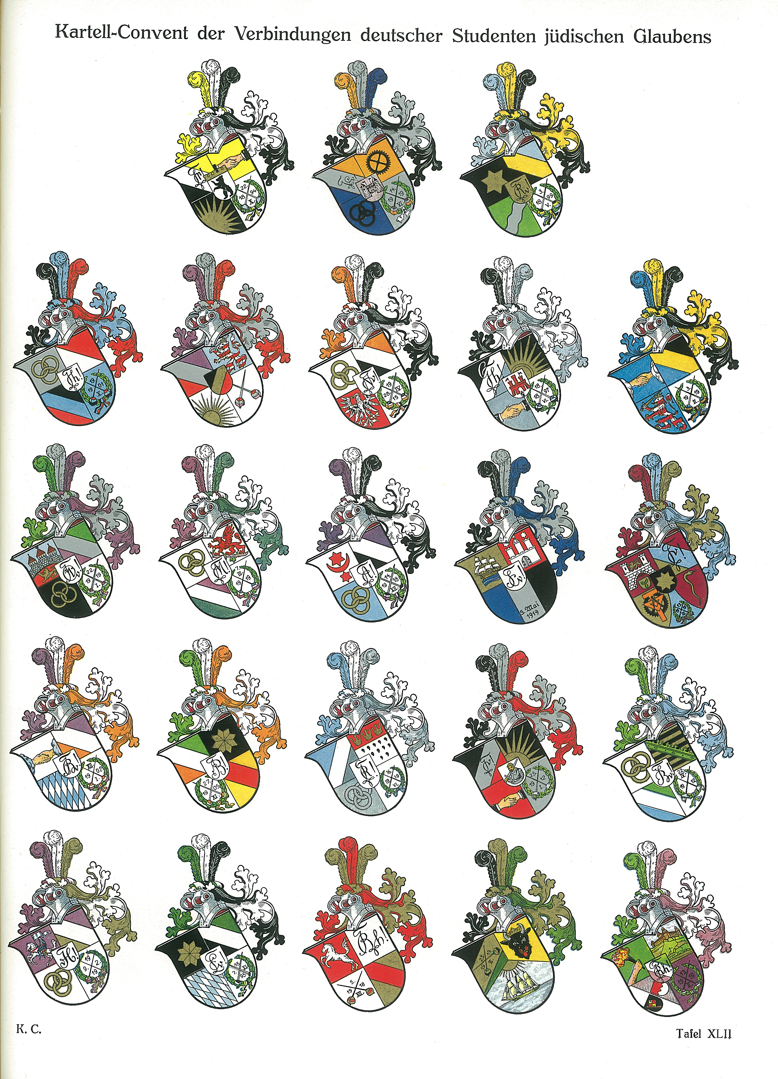 Jüdische Verbindungen des Kartell-Convents.